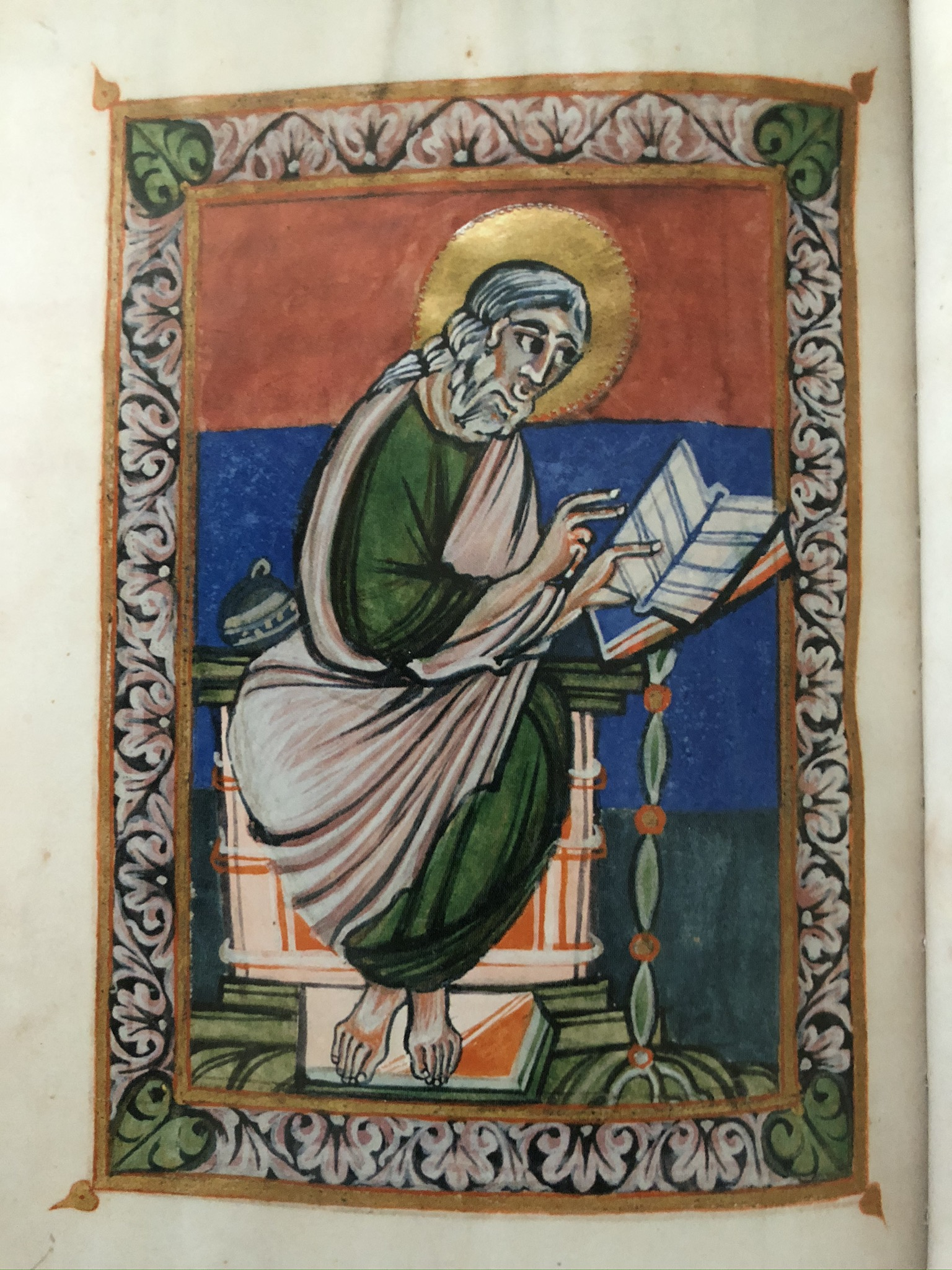 Bild des Evangelisten Lukas im Gerresheimer Evangeliar